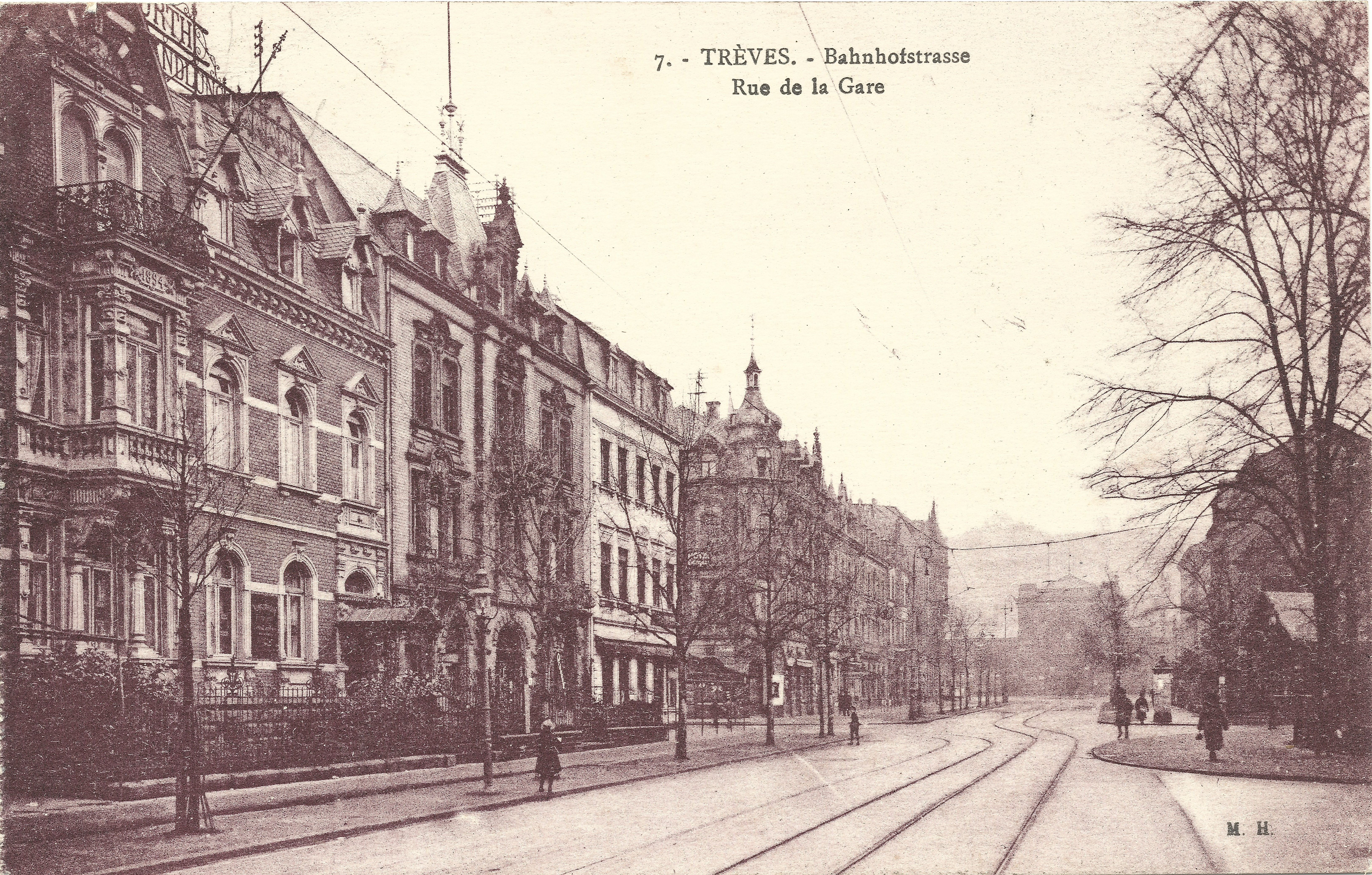 Historische Aufnahme der Bahnhofstraße in Trier. Im Hintergrund der Hauptbahnhof.